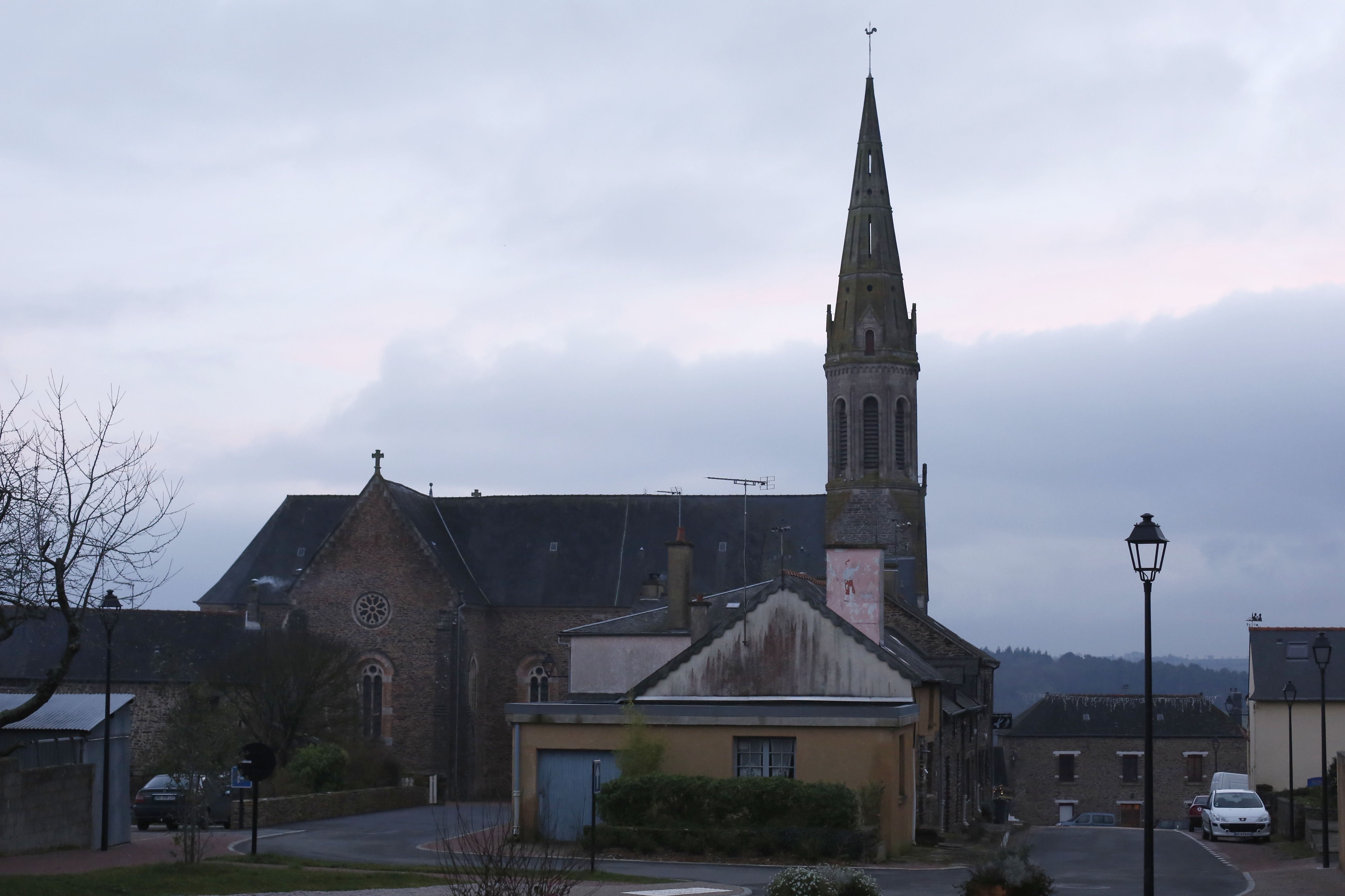 Église Saint-Étienne de Monterfil.